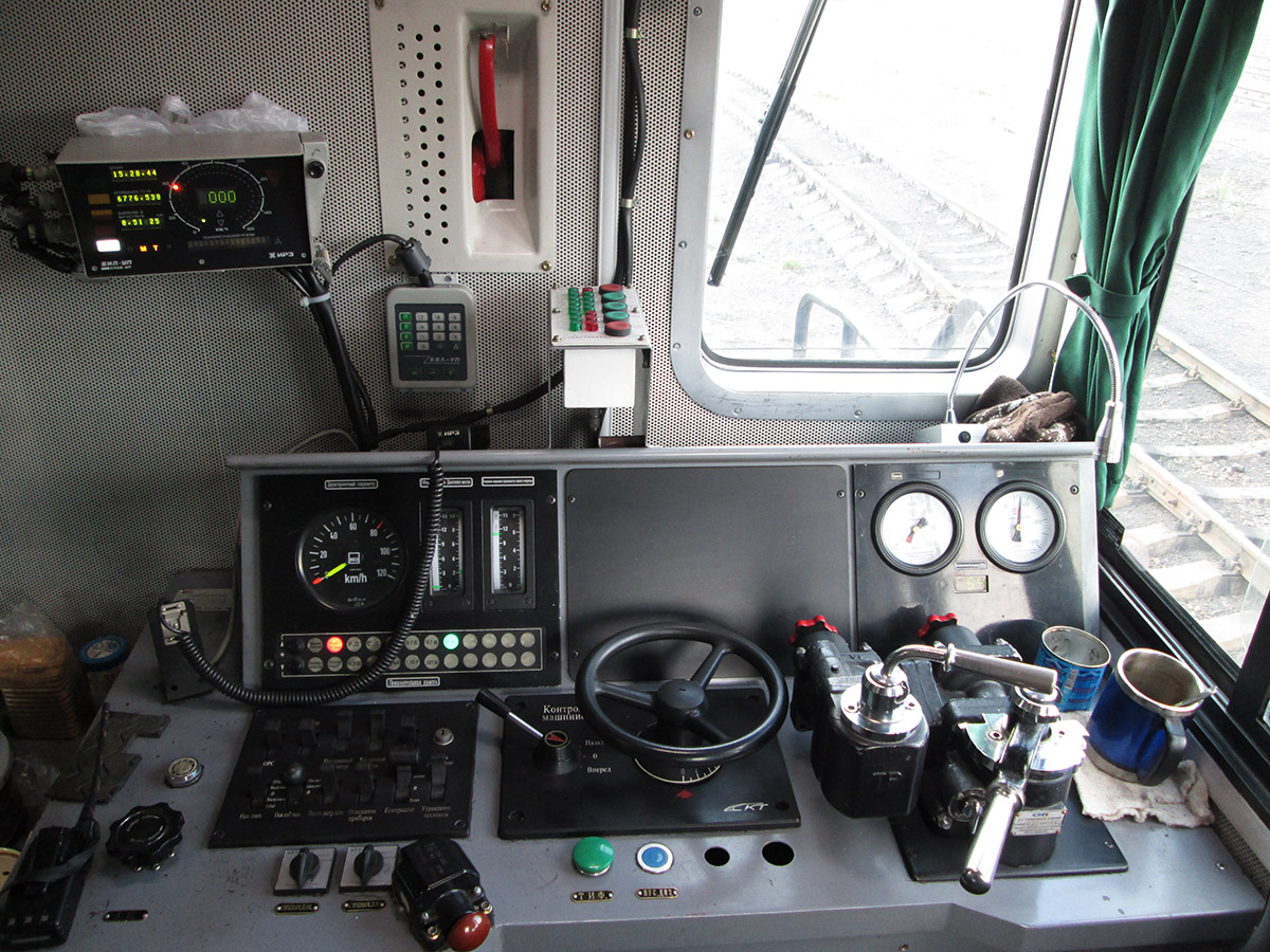 Пульт машиниста тепловоза ТЭМ-KZ-0016, расположенный со стороны ближнего торца Казахстан, Карагандинская область, станция Шахты